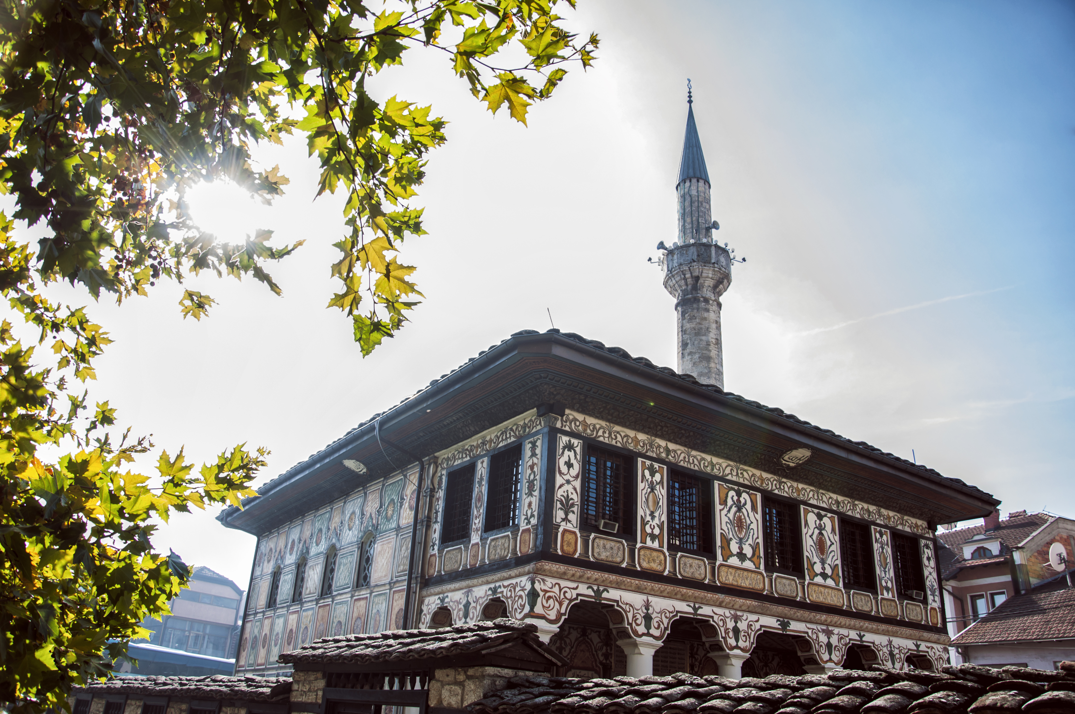 Шарената џамија во Тетово сликана аголно преку ден.